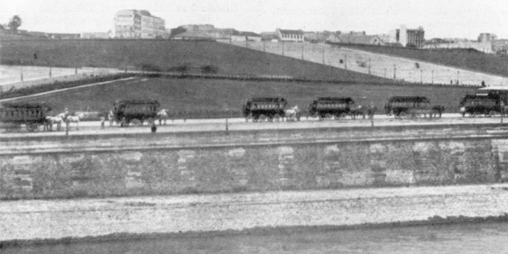 Le « Chemin-de-fer Américain », une ligne de tramways hippomobiles établie lors de l’exposition de 1867. Ici, vue du quai de Billy.